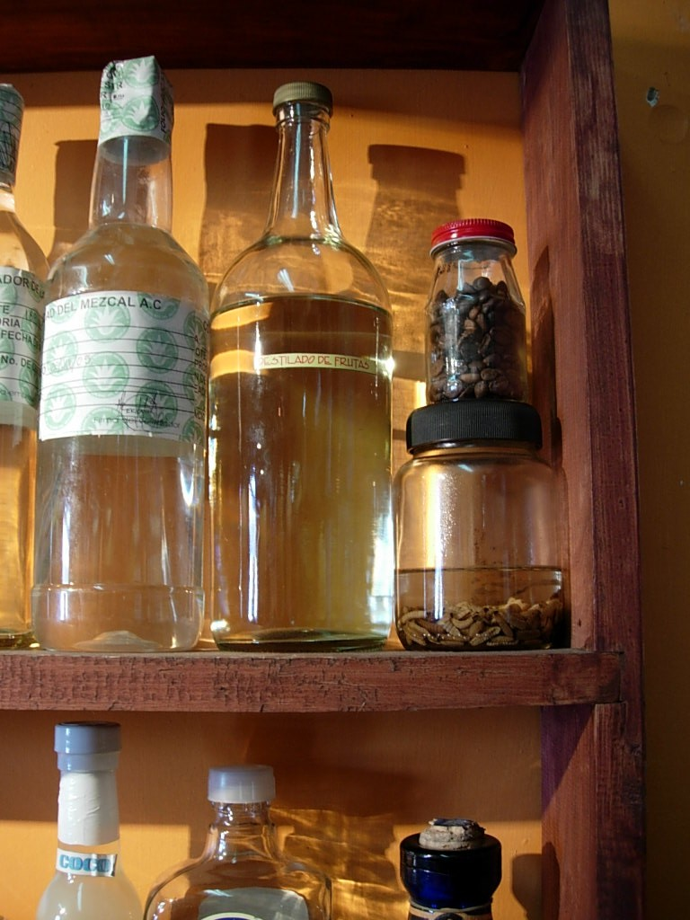 "Mezcal" in Oaxaca, Mexico.